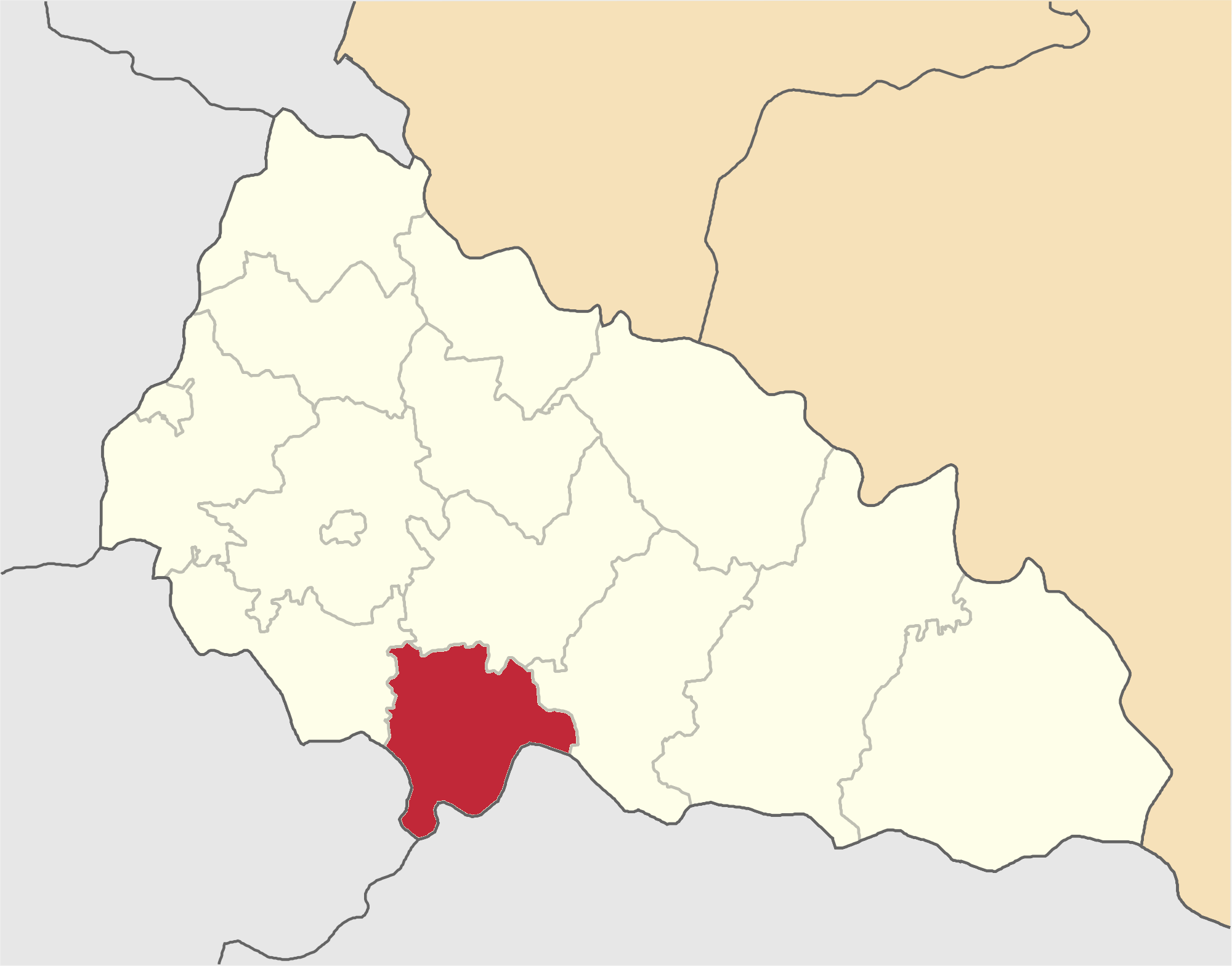 Vynogradivskyi-Raion map